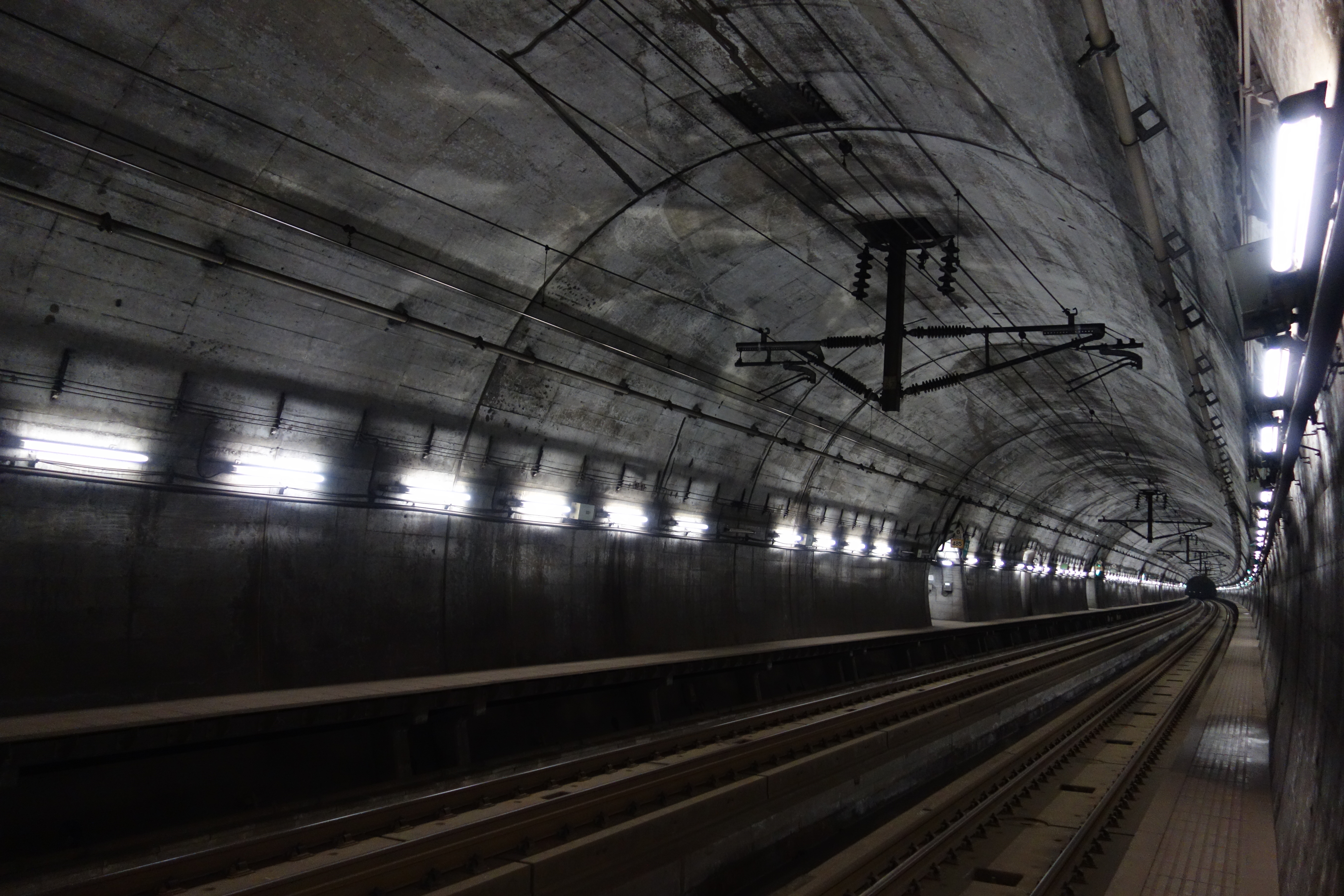 JR北海道 津軽海峡線 竜飛海底駅